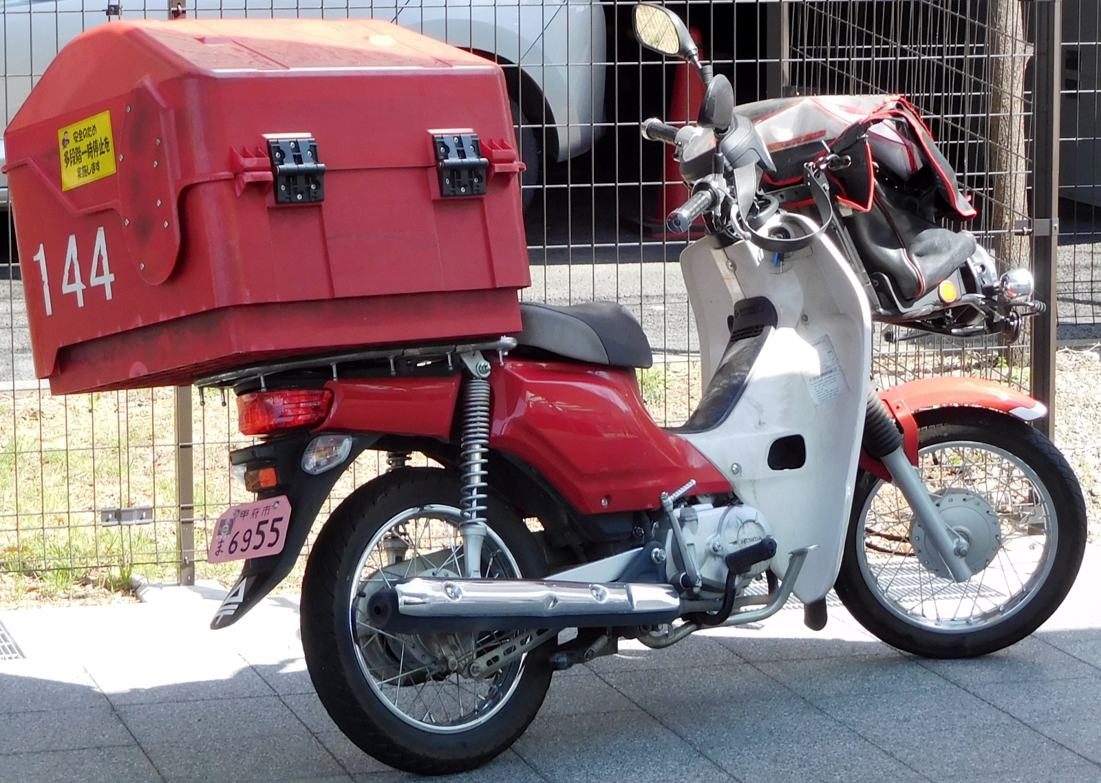 日本郵便のスーパーカブ110MD